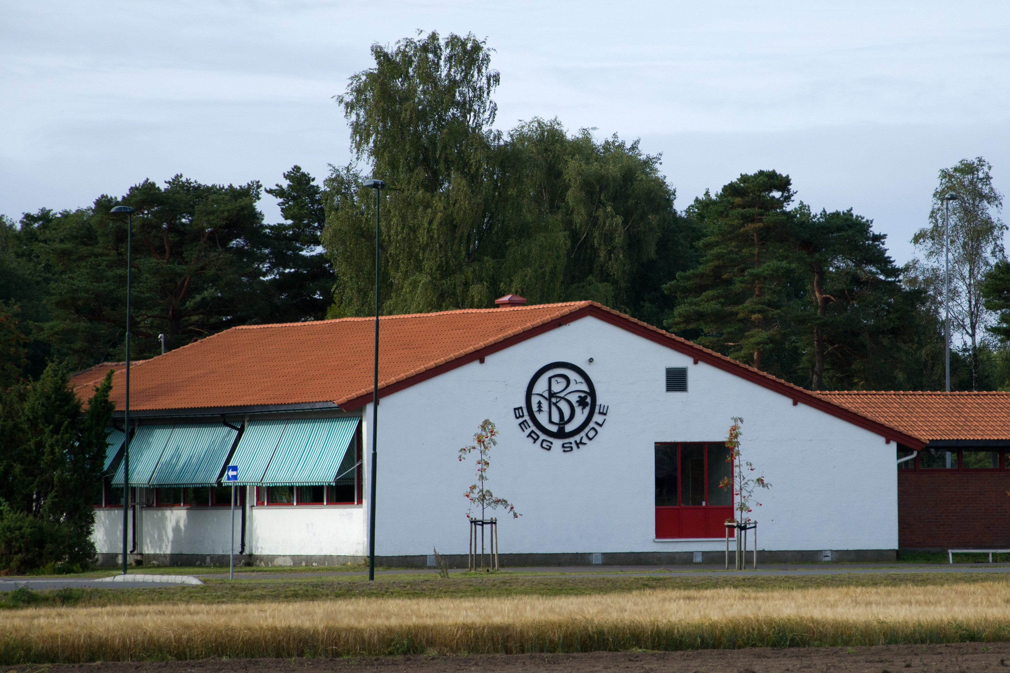 Berg skole ved Helgeroa i Larvik kommune